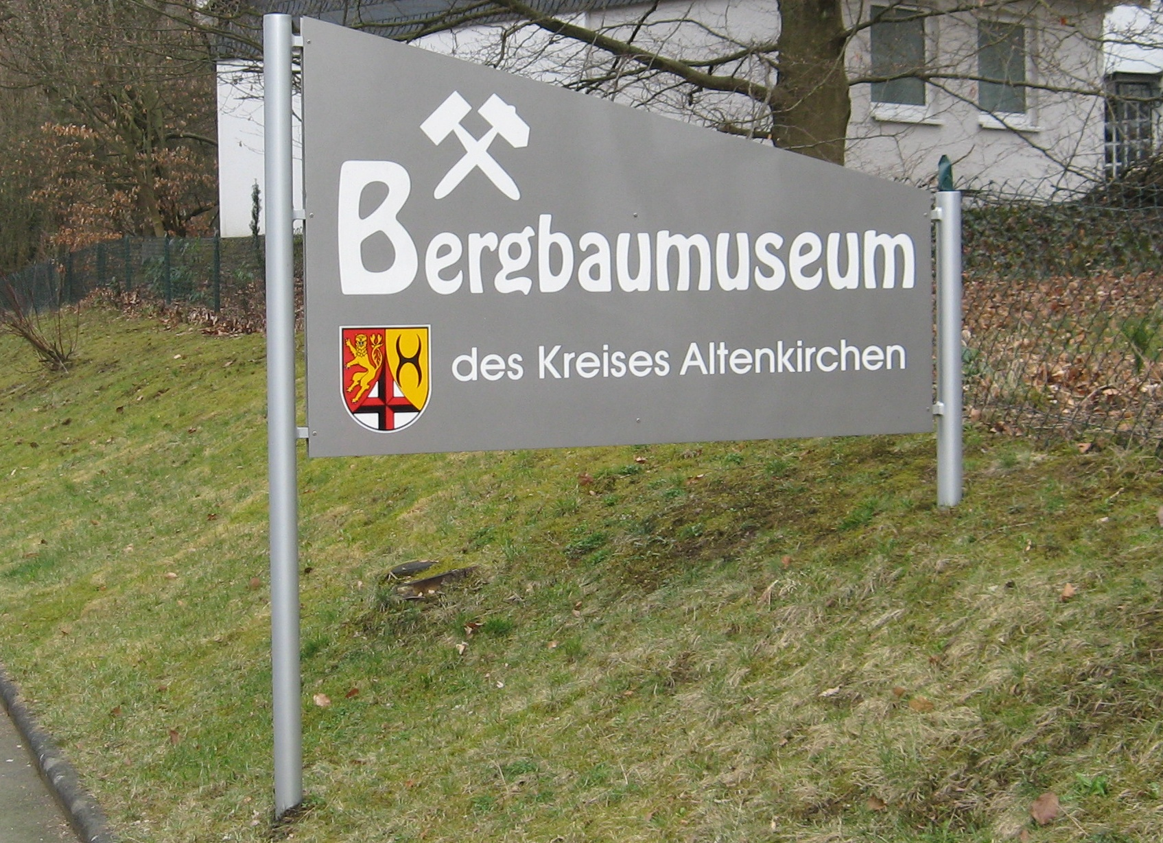 Eingangsschild des Sassenrother Bergbaumuseums.